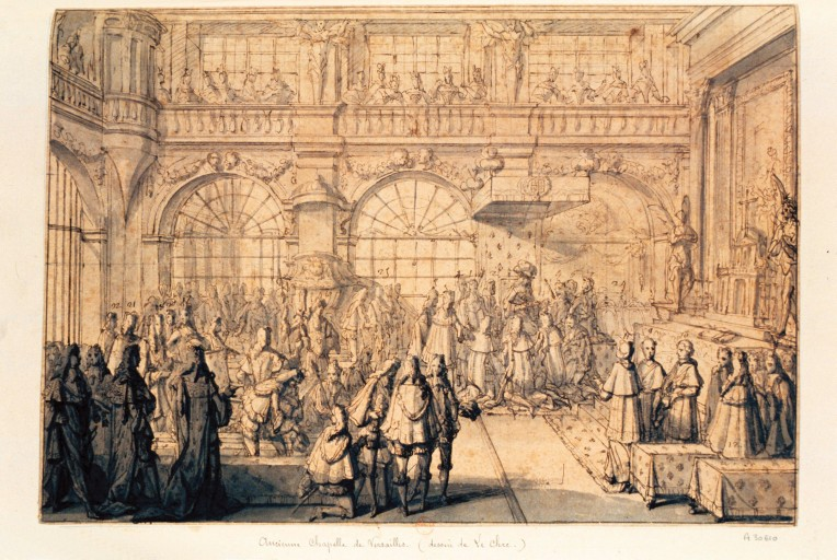 Ancienne Chapelle de Versailles. Réception des chevaliers de l'ordre du Saint-Esprit par le roi les 1er janvier et 2 février 1689 - Dessin de Leclerc, Sébastien (1637-1714)